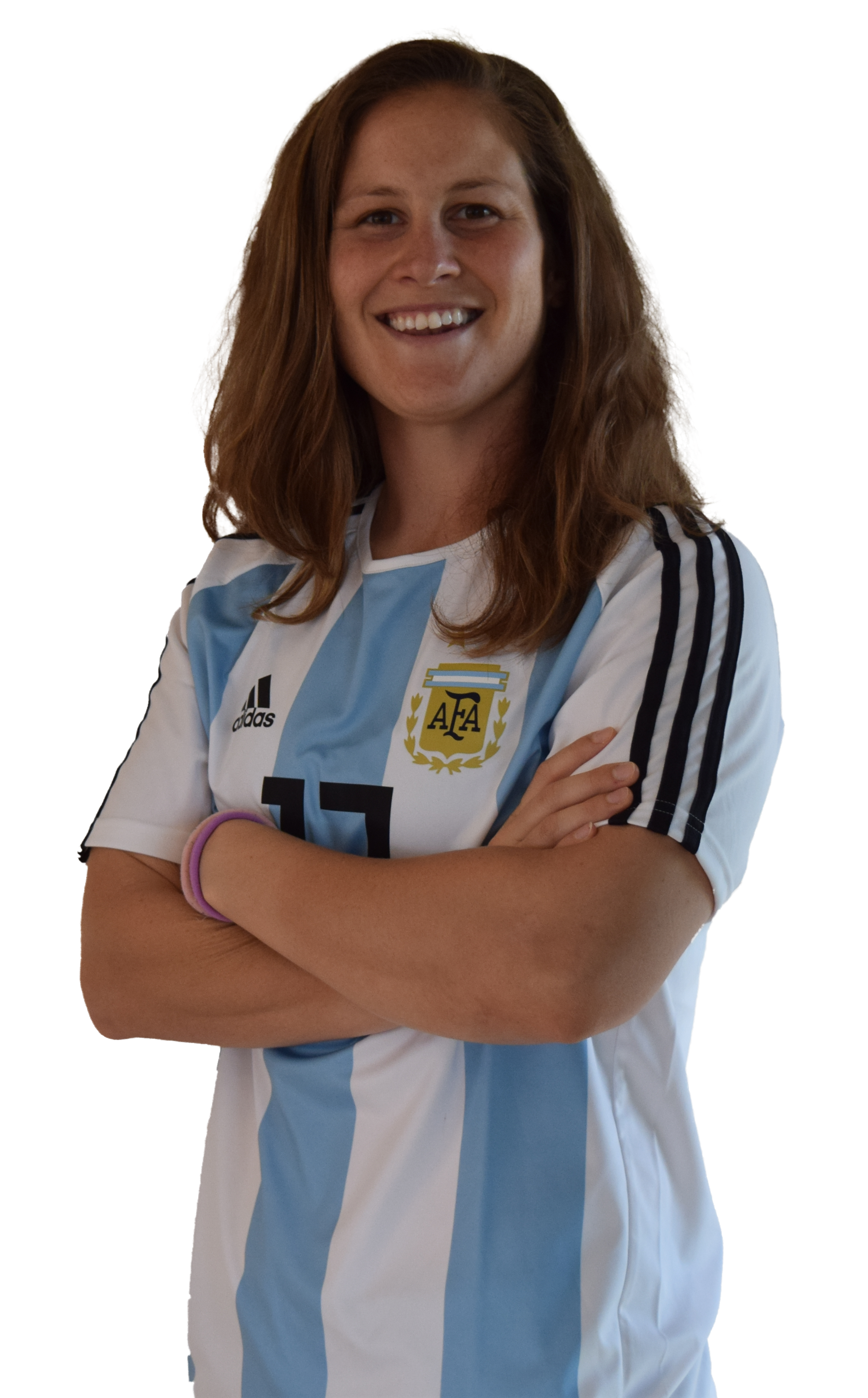 Gabriela Garton, jugadora de la selección mayor femenina de fútbol de Argentina.Foto sacada previo al primer partido del repechaje por un lugar para el mundial de futbol femenino de Francia 2019